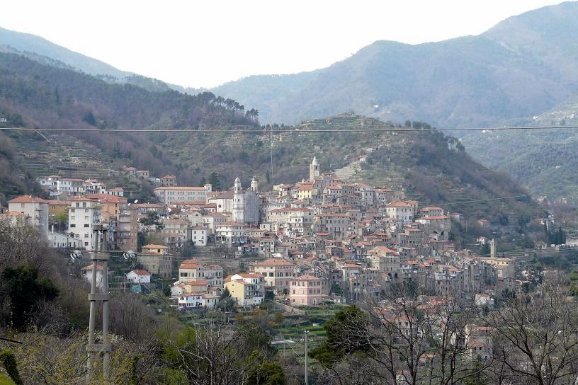 Ceriana, Liguria, Italia